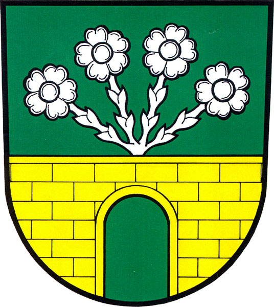 znak obce Norberčany